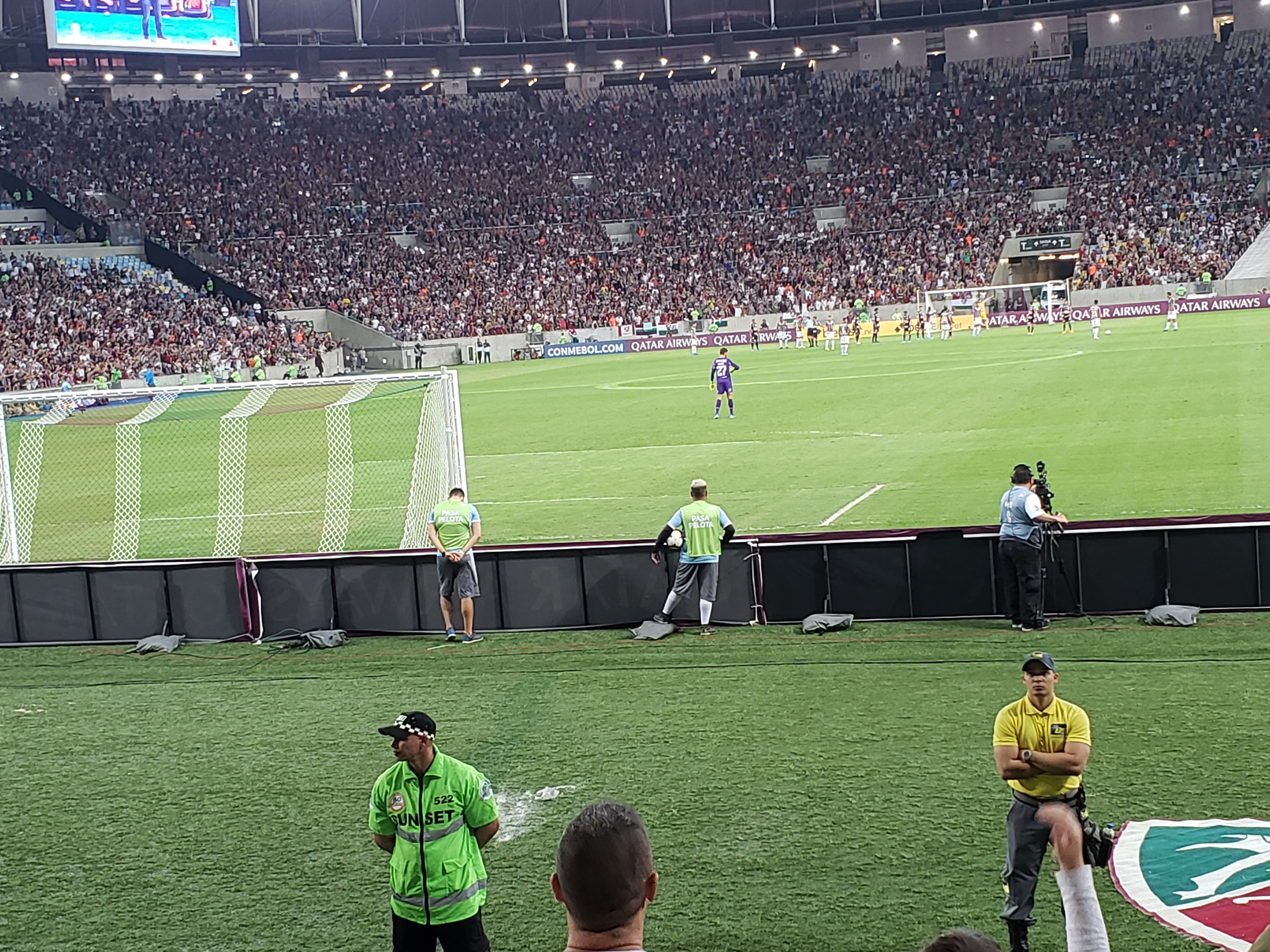 Fluminense Football Club contra o Corinthians na Copa Sul-Americana de 2019, partida disputada no Maracanã em 29/08/2019 e que terminou empatada por 1 a 1 perante 57.703 torcedores presentes.